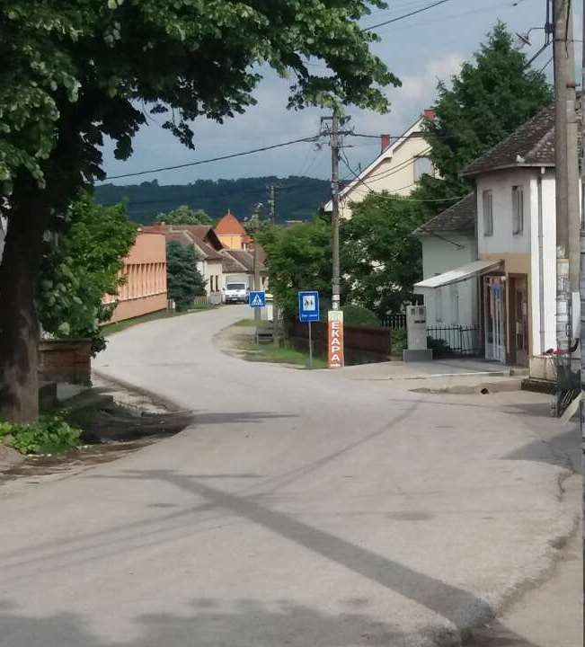 Српски (ћирилица): Центар Средњева